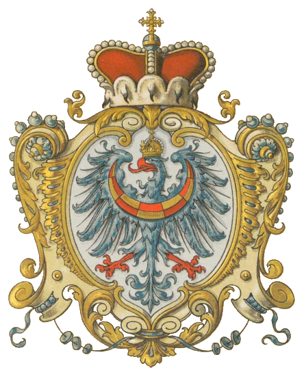 Wappen des Herzogtums Krain